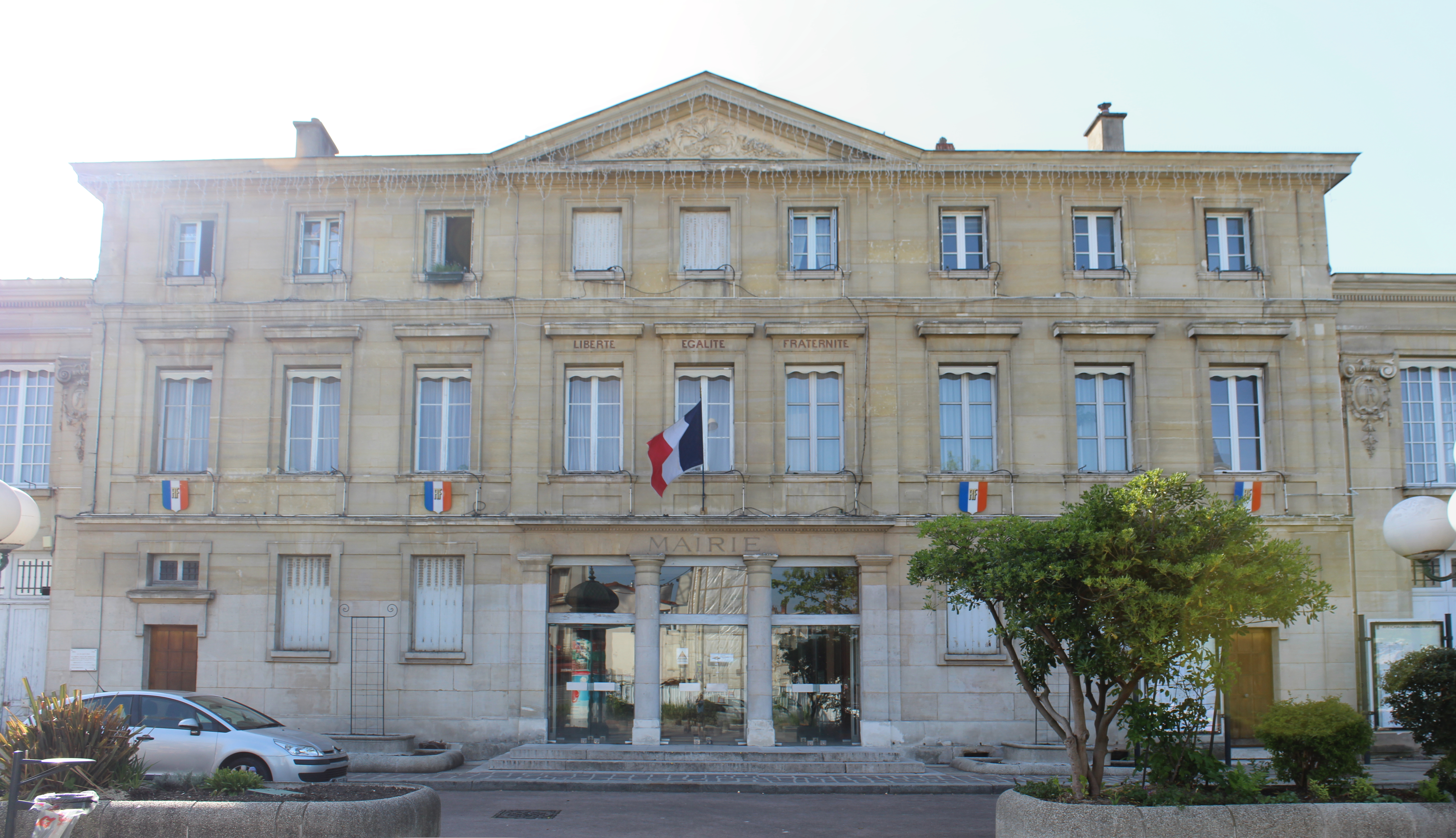 Mairie de Romainville.